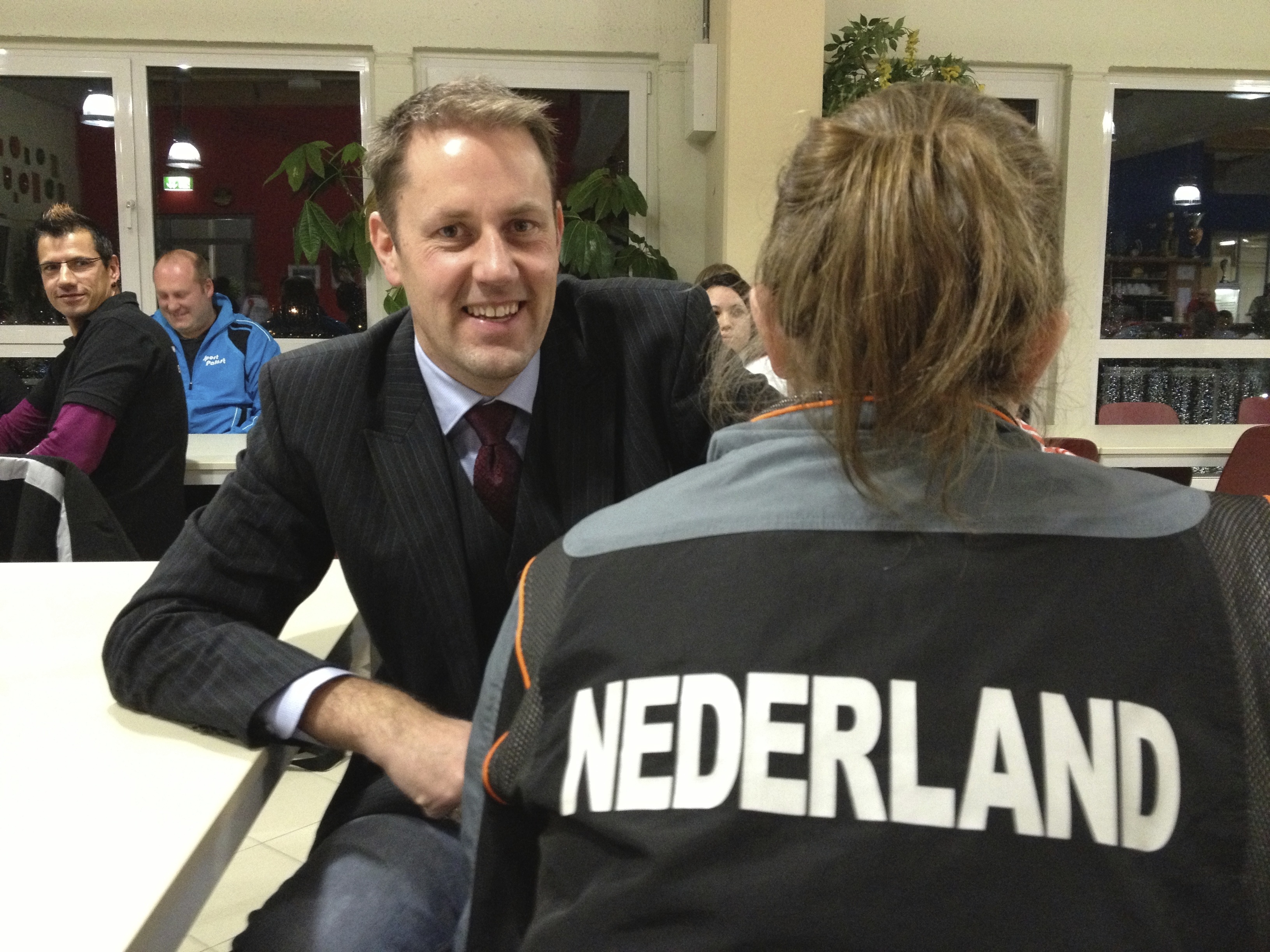 Christian Holstad Lilleng var landslagstrener i Nederland 2013-2014.